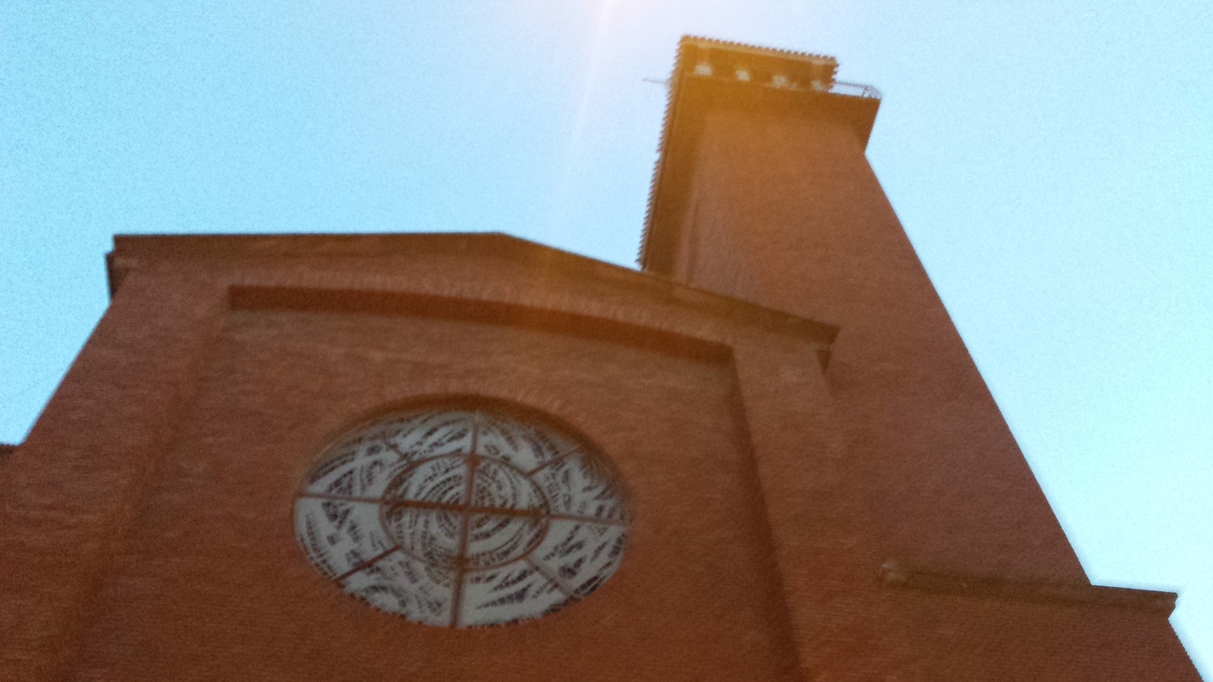 Parroquia / Iglesia de San Francisco. Franciscanos. Barrio Franciscanos. Albacete.